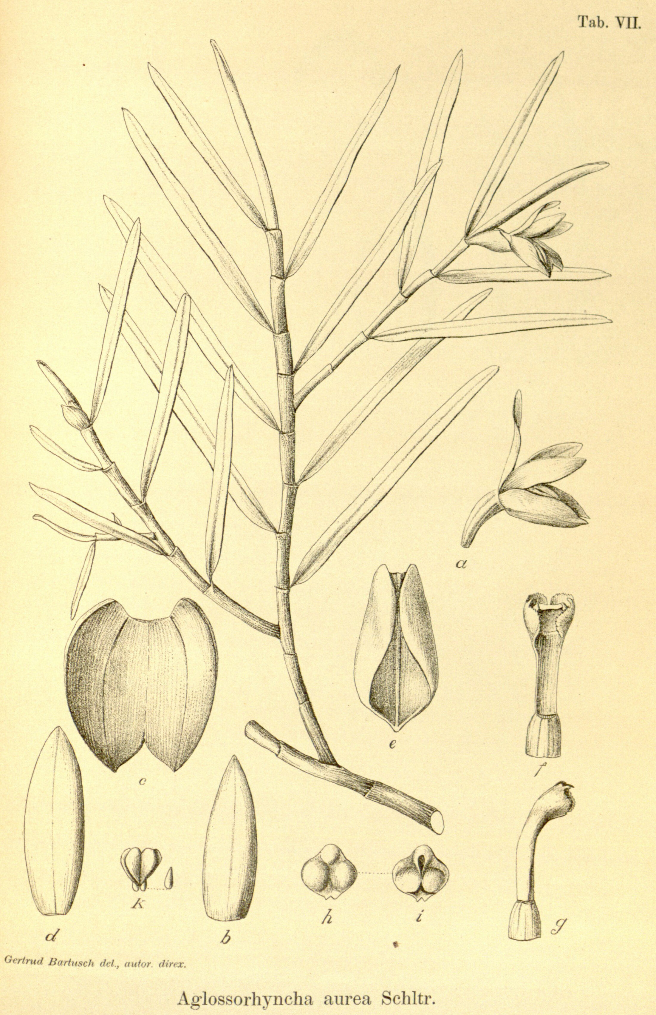 Aglossorrhyncha aurea